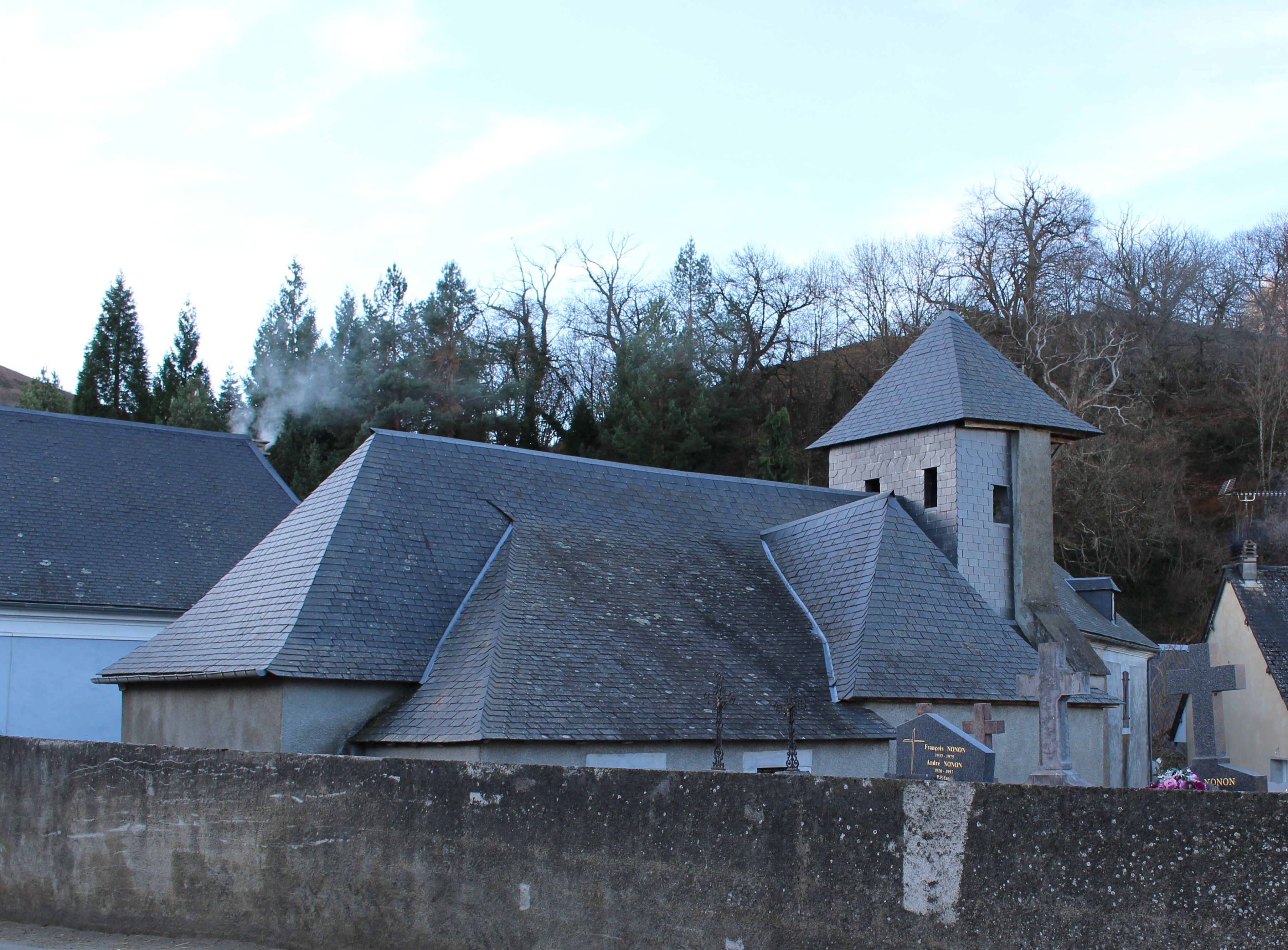 Église de l’Assomption de Berbérust (Hautes-Pyrénées)